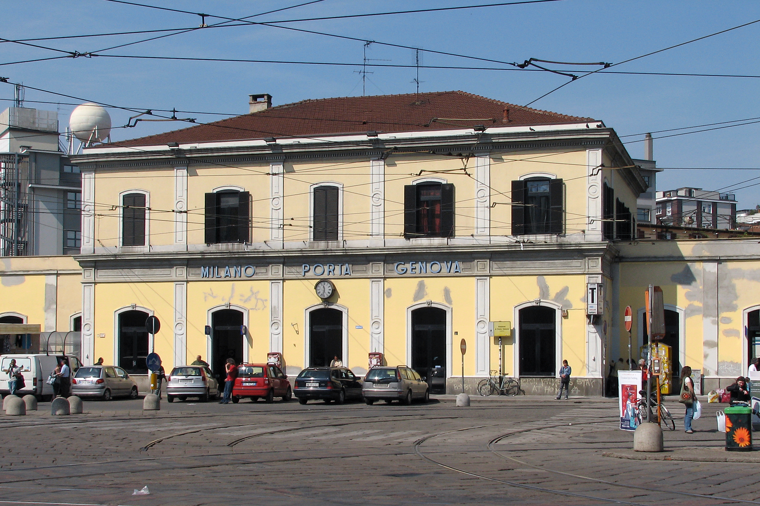 Il Fabbricato Viaggiatori della stazione di Milano Porta Genova.